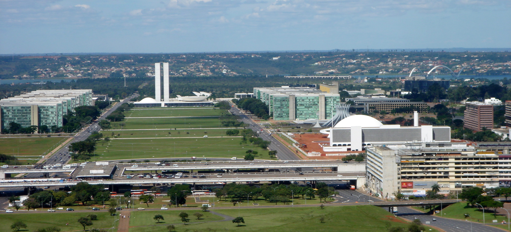 Esplanada dos Ministérios, Brasília, D.F.